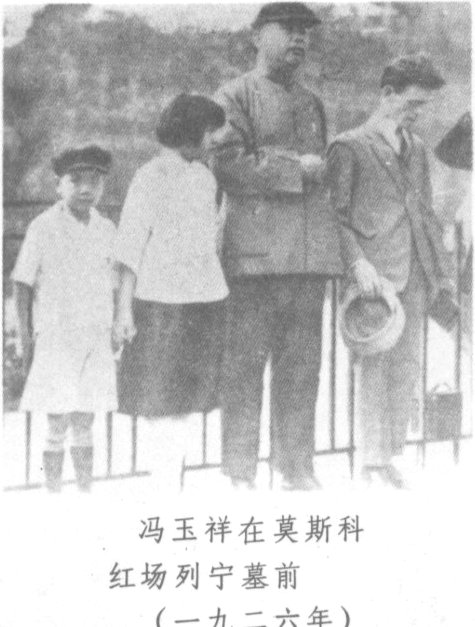 冯玉祥在莫斯科红场列宁墓前（1926年）